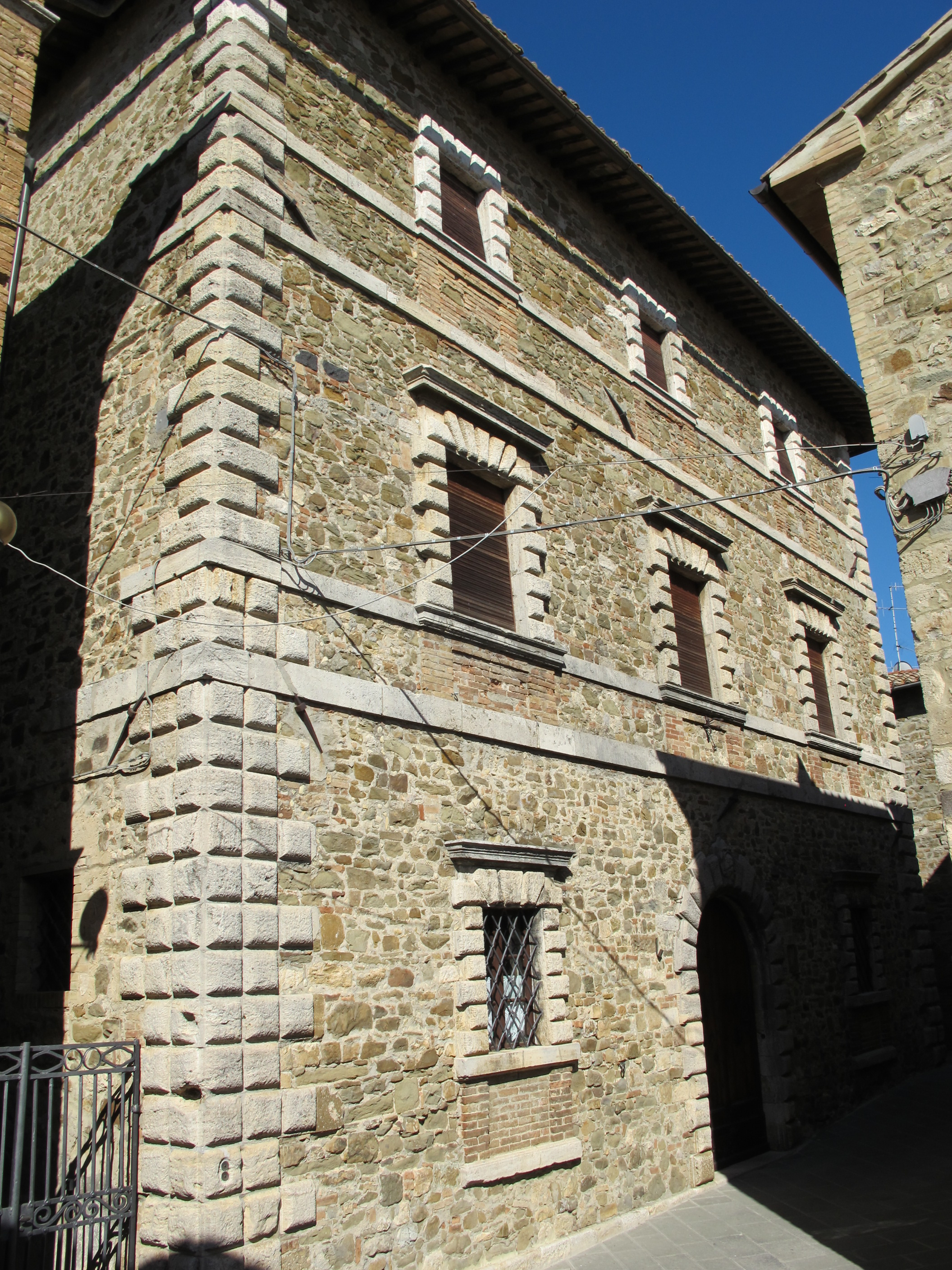 Castelnuovo dell'Abate, palazzo